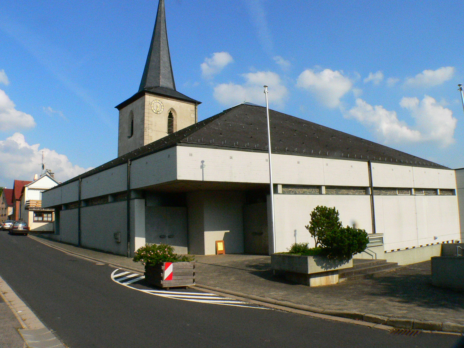 Sandsteinbrunnen in Schonungen, Ortsteil Forst, Germany, Bavaria